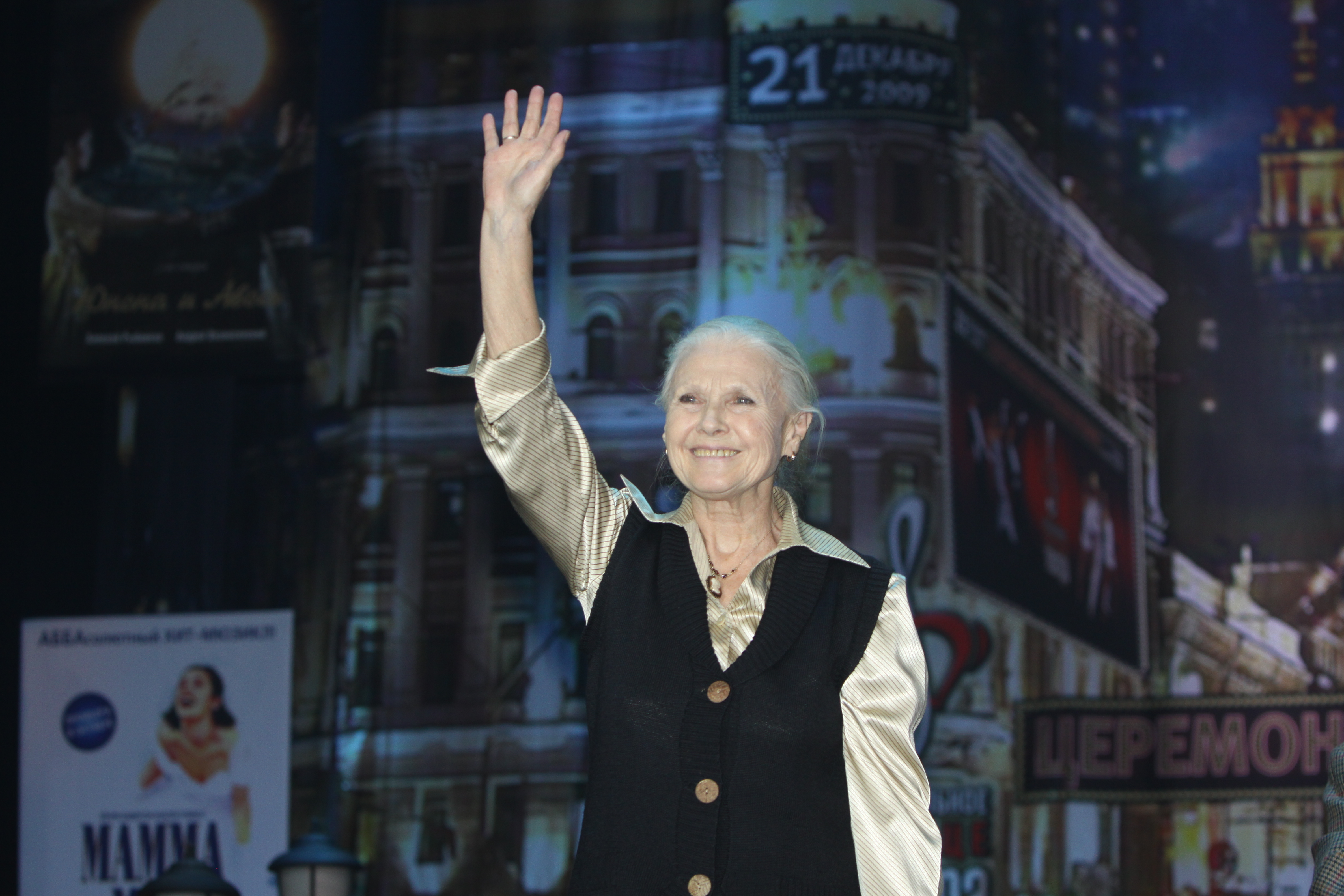 Мария Пахоменко на церемонии вручения премии "Музыкальное сердце театра", 2009